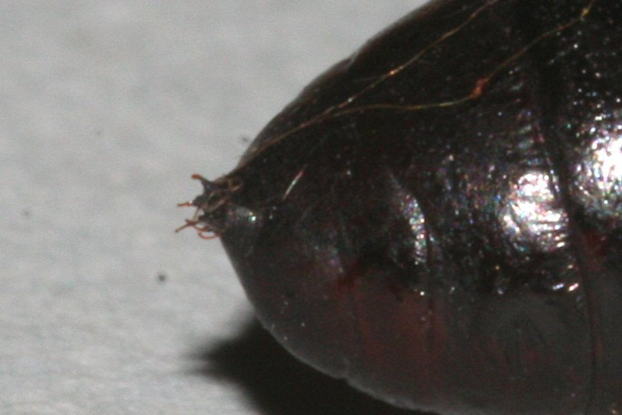 Kremaster der Puppe des Gelbbraunen Zahnspinners (Notodonta torva)